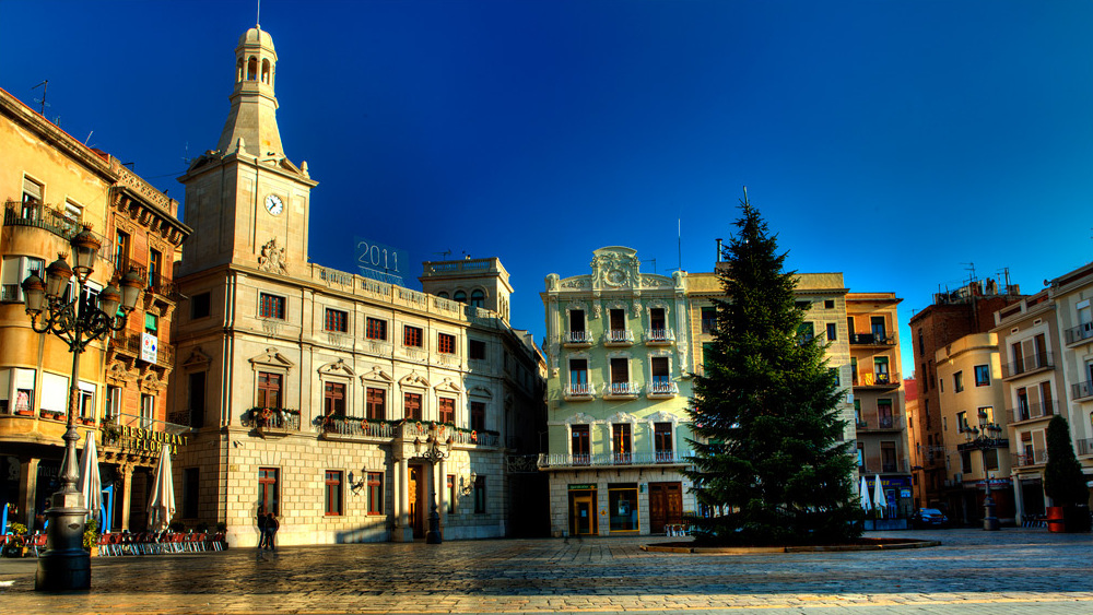 Rathausplatz Reus (Tarragona, España)